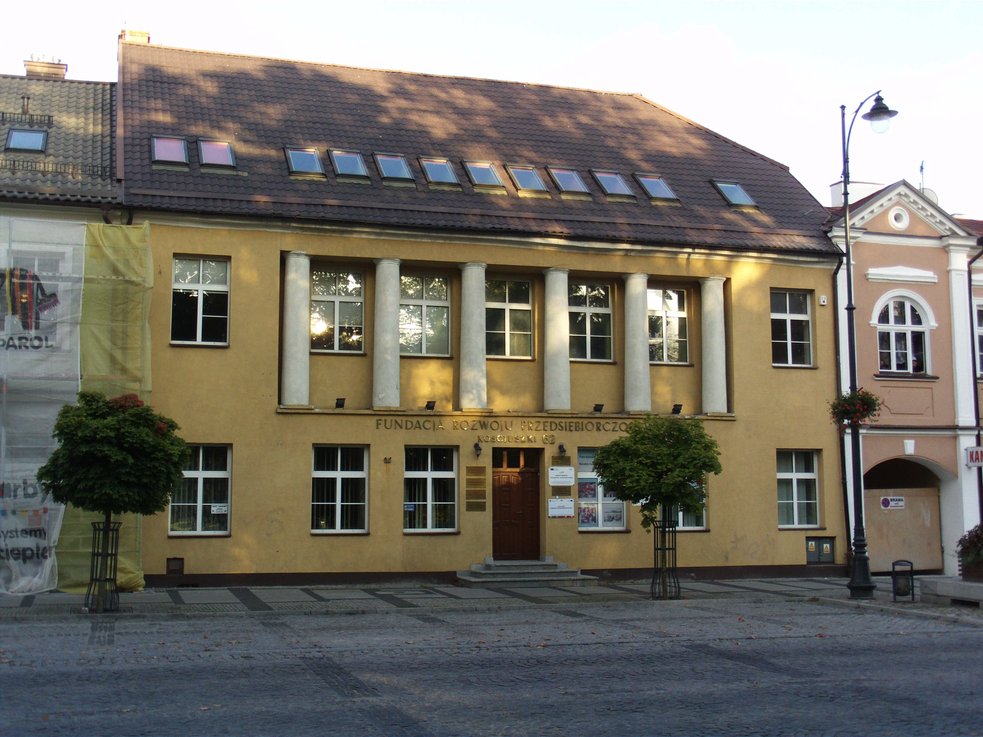 Suwałki ul. Kościuszki 62